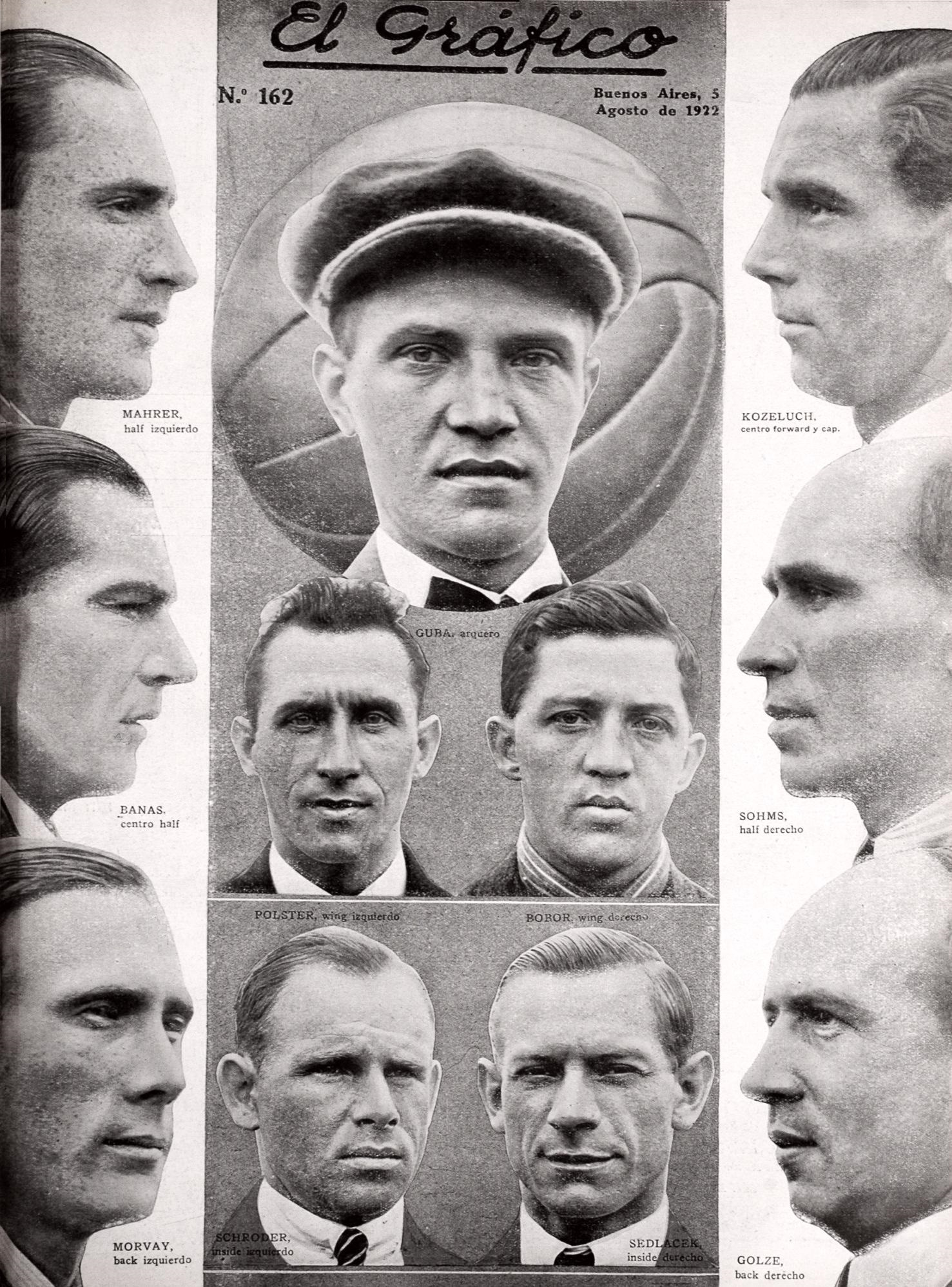 El Grafico del 05 de Agosto de 1922. Edicion 162